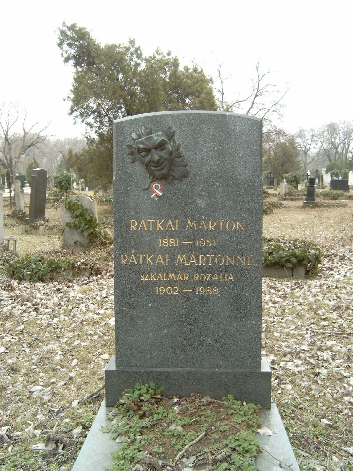 Rátkai Márton (Bp., 1881. nov. 18. – Bp., 1951. szept. 18.) színész sírja Budapesten. Kerepesi temető: 33-1-56.